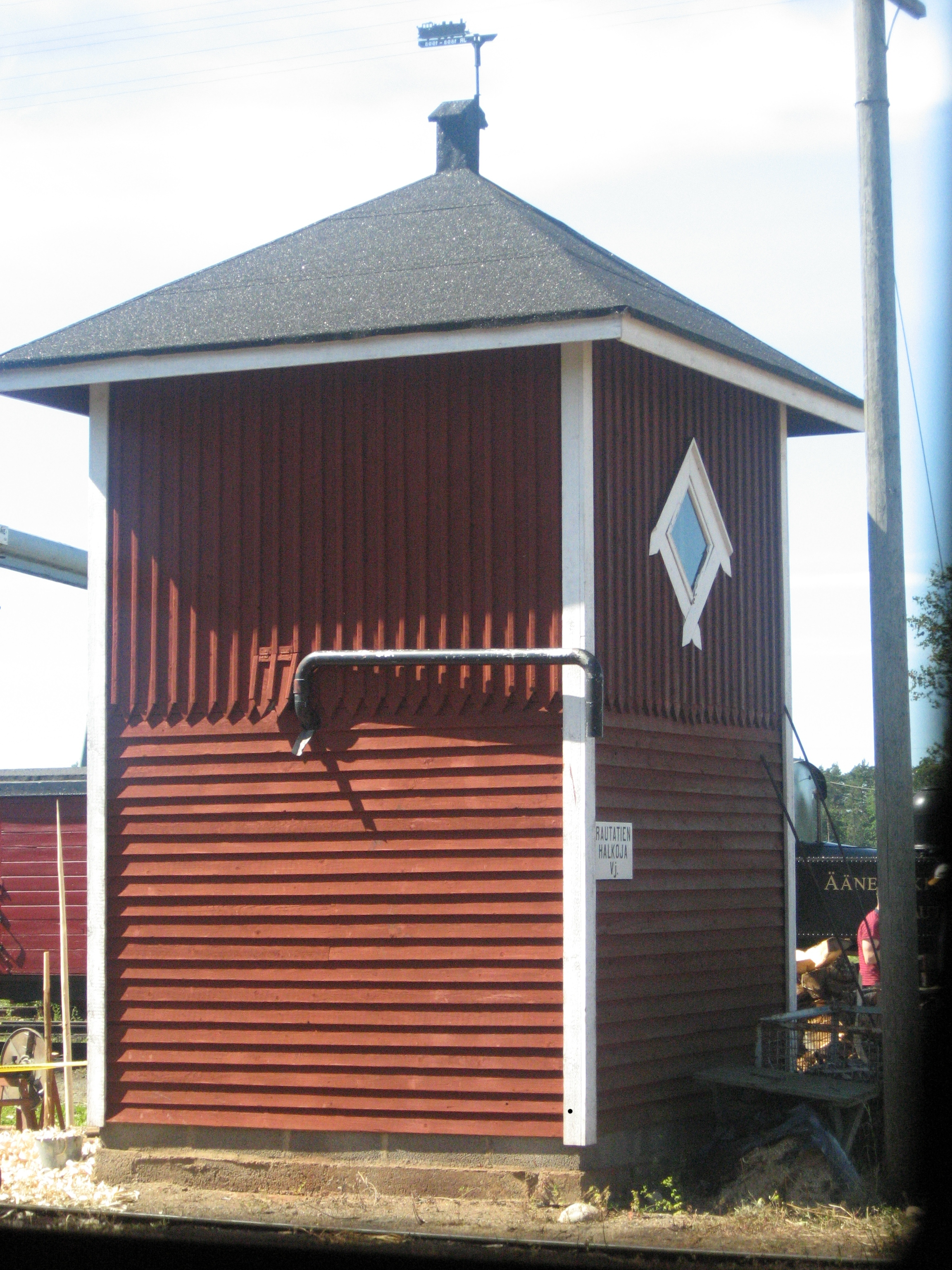 Minkiön vesiviskuri